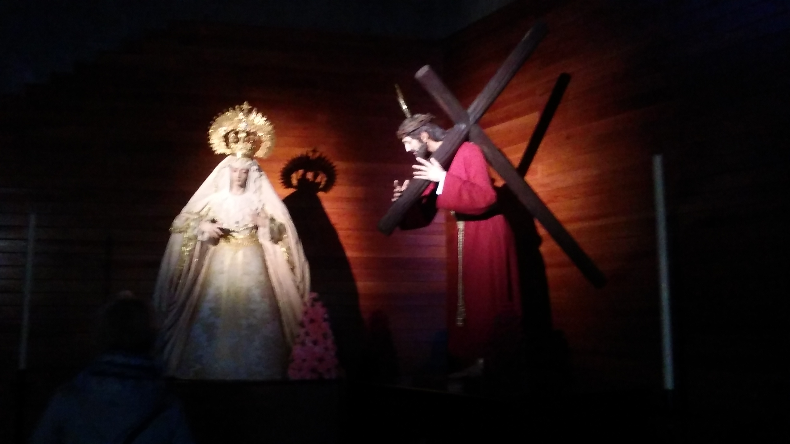 Imágenes titulares de la Hermandad y Cofradía del Santísimo Cristo de la Salvación y María Santísima de las Bienaventuranzas Iglesia de Nuestra Señora del Perpetuo Socorro en Jerez de la Frontera (Andalucía, España)